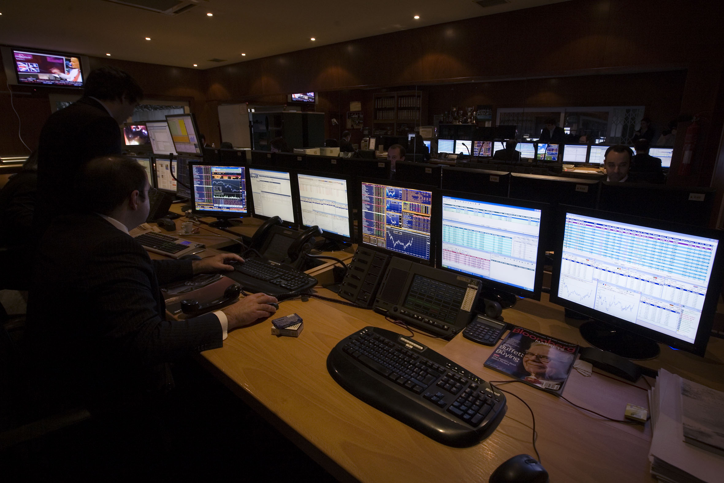 Sala de Negociação da GoBulling